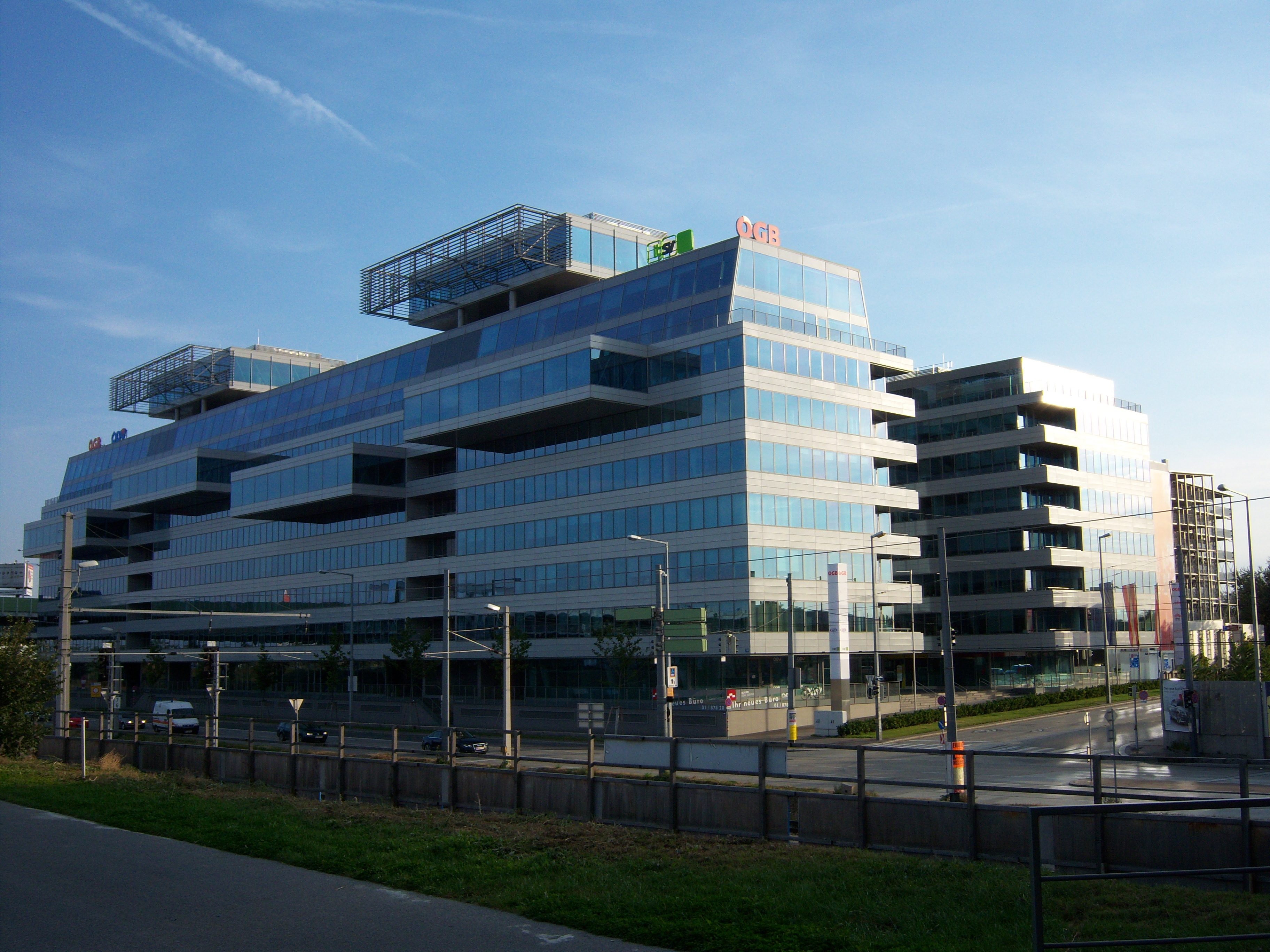 Zentrale des Österreichischen Gewerkschaftsbund am Handelskai